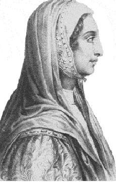 Portrait de Béatrice Lascaris de Tende